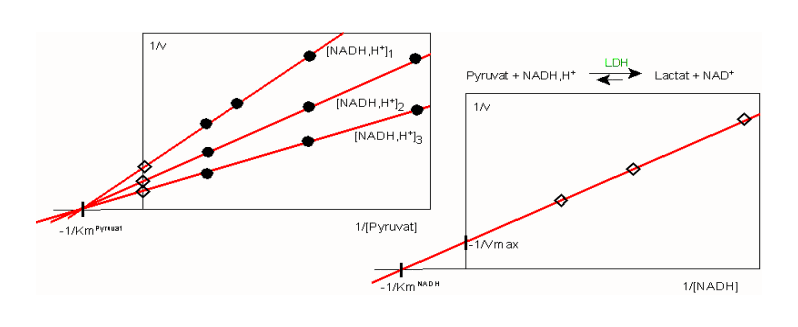 Mehrsubstratreaktion am Beispiel der LDH-Reaktion: Variation beider Substrate